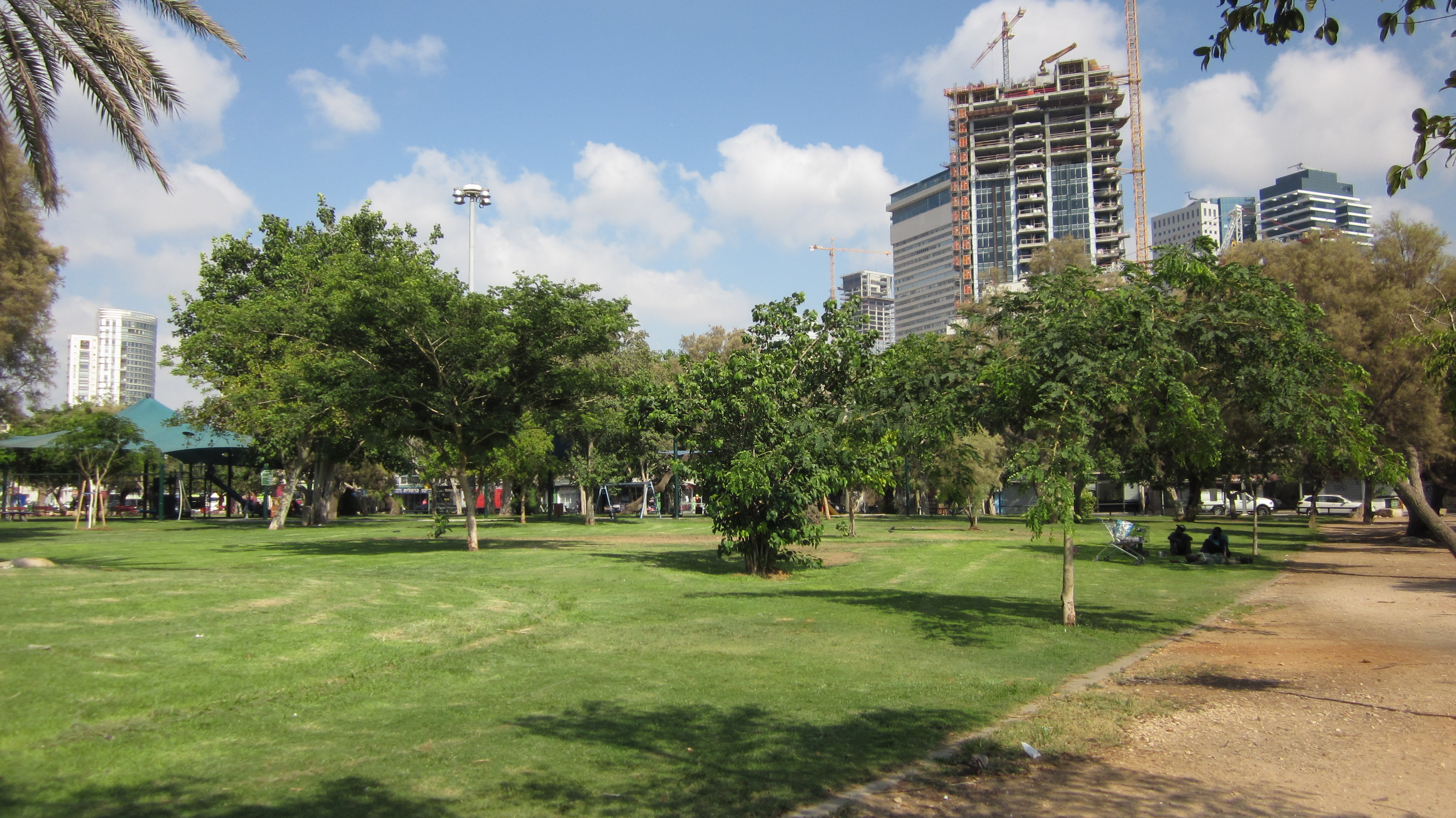 ליבת הגן: מרבד דשא נרחב; מאסה צימחית גדולה כשברקע מגדלי מגורים